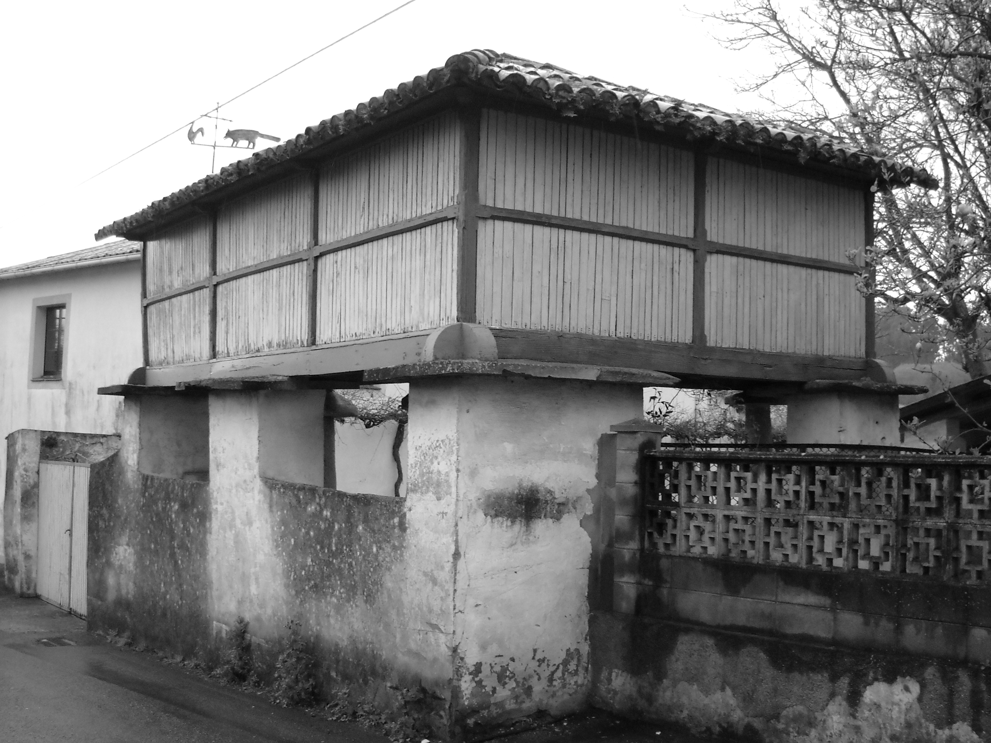 Hórreo en esquina, O Tarabelo, Santa María de Sada, Sada